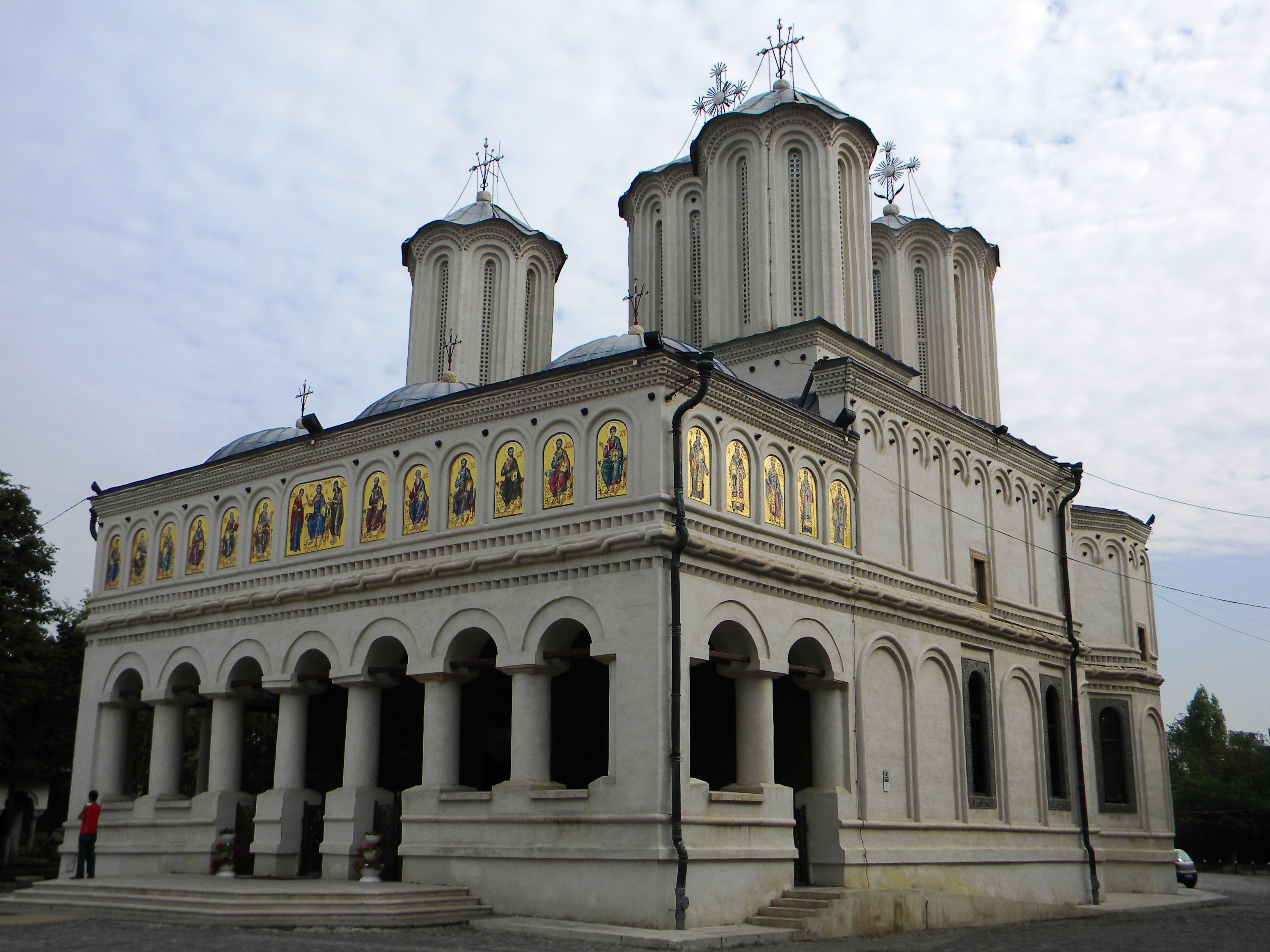 Bucuresti, Romania, Catedrala Patriarhala Sfintii Imparati Constantin si Elena; B-II-m-A-18571.01 (8) 01